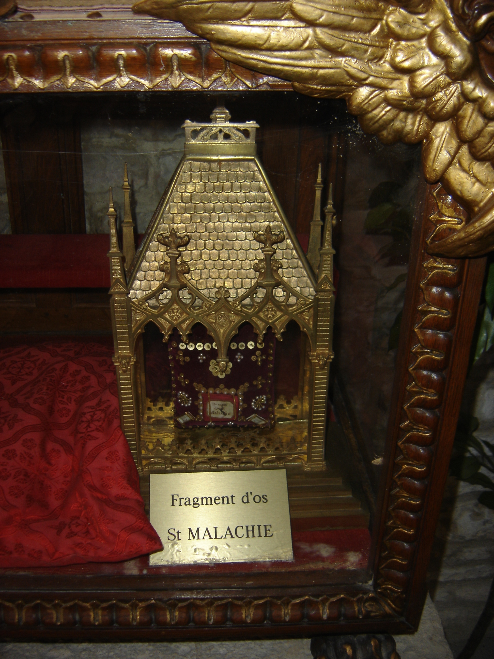 Fragment d'os de Saint Malachie - église de Ville-sous-la-Ferté (Clairvaux) - Aube - France